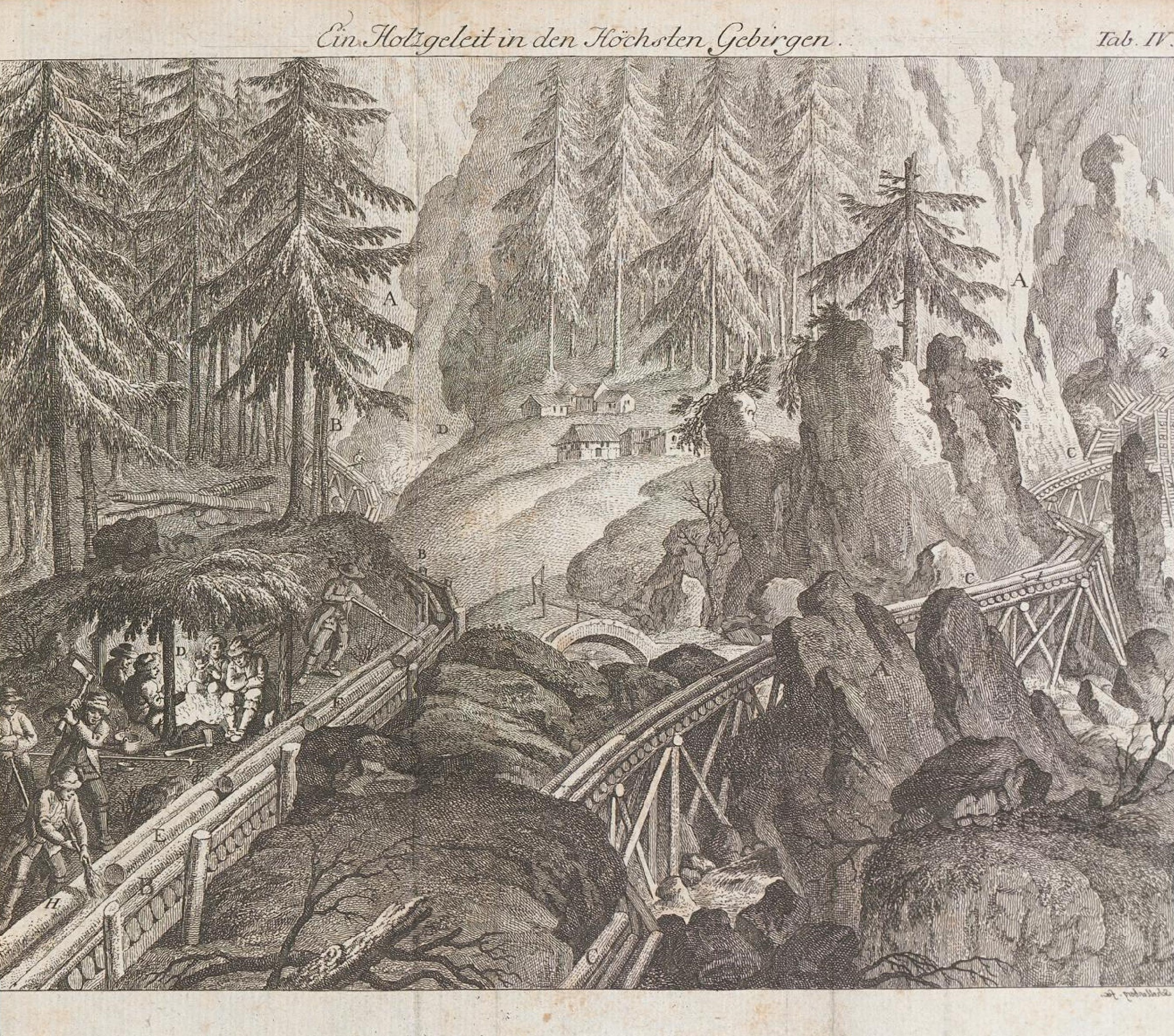 Soveneda, Val Pontirone TI, Schweiz: Legende: A) Zwei Bergtäler B) Hauptgeleit für Holz vom Hochwald C) Geleit aus Nebental C1) Balkenkonstrukion ohne Nägel, Damm mit Pfählen befestigt C2) Sammler, der die Stämme (Burren) in das Geleit führt D) einer der Burratori-Posten mit Beleuchtungsfeuer E) Stämme in vollem Lauf F) Burratore weist Stämmen die Richtung G) Burratore bezeichnet Stämme mit Axthieb H) Geleitreinigung